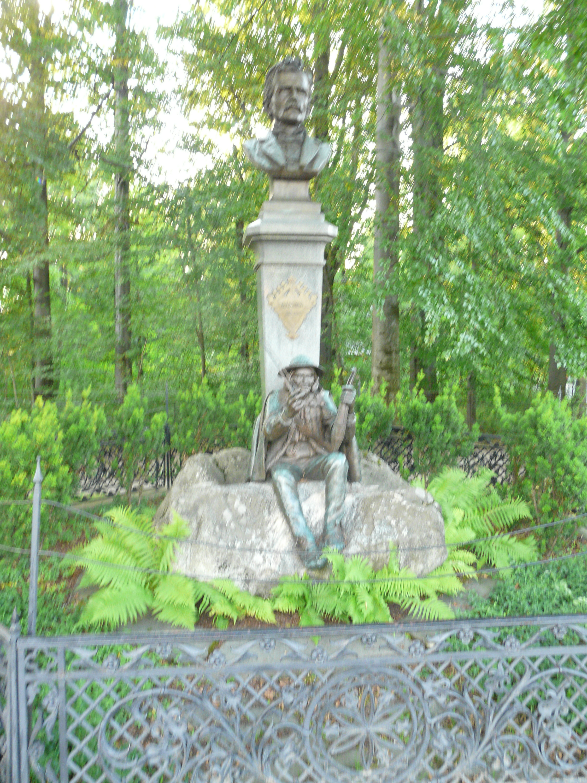 Zakopane